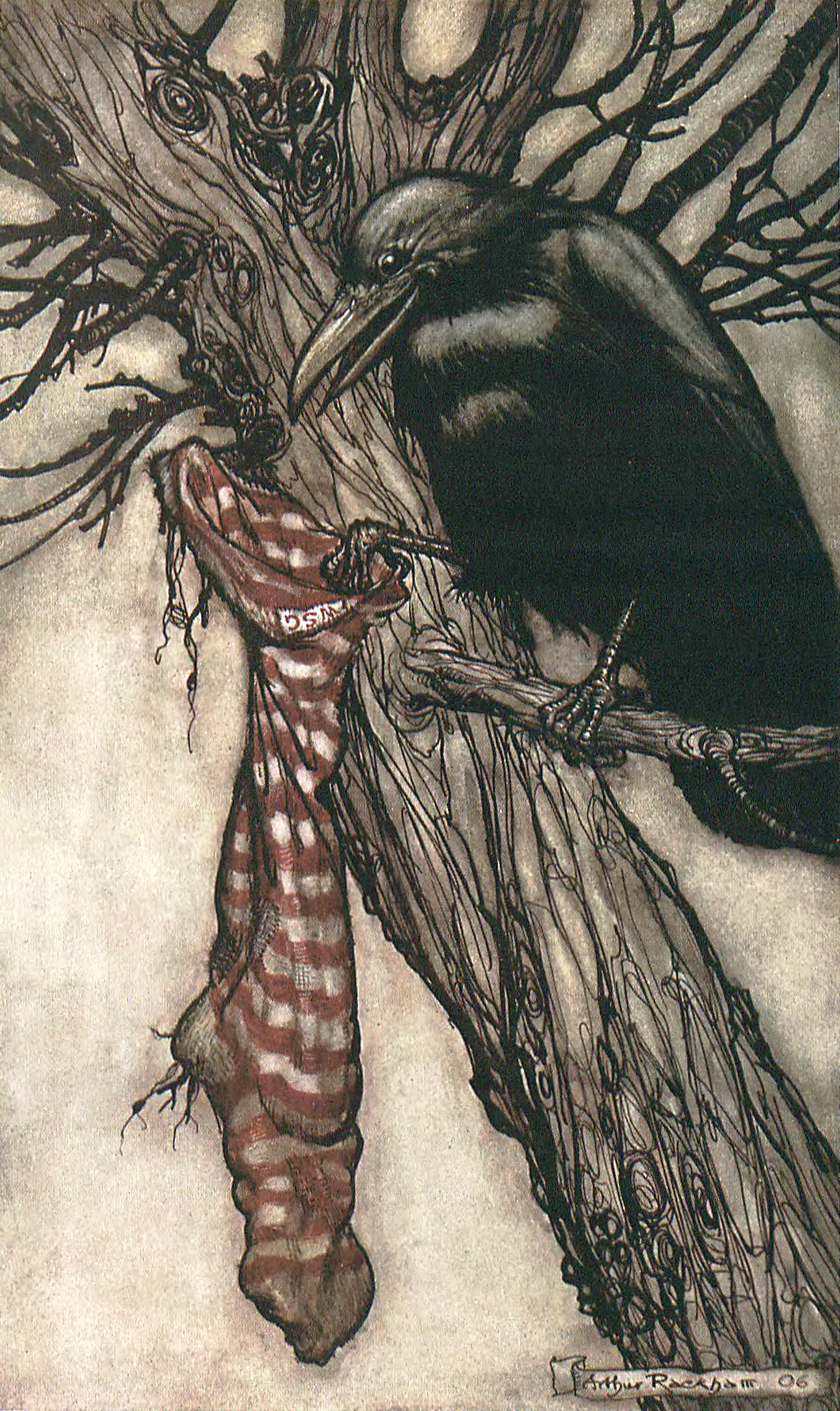 grafika z książki PL "Przygody Piotrusia Pana" publikacja Wydawnictwo J. Mortkowicza Warszawa 1914